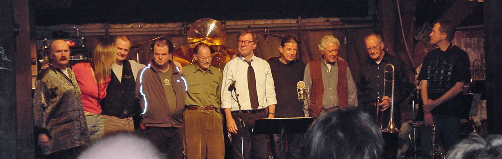 United Jazz and Rock Ensemble - Farewell Tour (from left to right: Wolfgang Dauner, Barbara Thompson, Jon Hiseman, Dave King, Ian Carr, Volker Kriegel, Rüdiger Baldauf, Ack van Rooyen, Albert Mangelsdorff, Christof Lauer) - in the "Fabrik" in Hamburg Altona